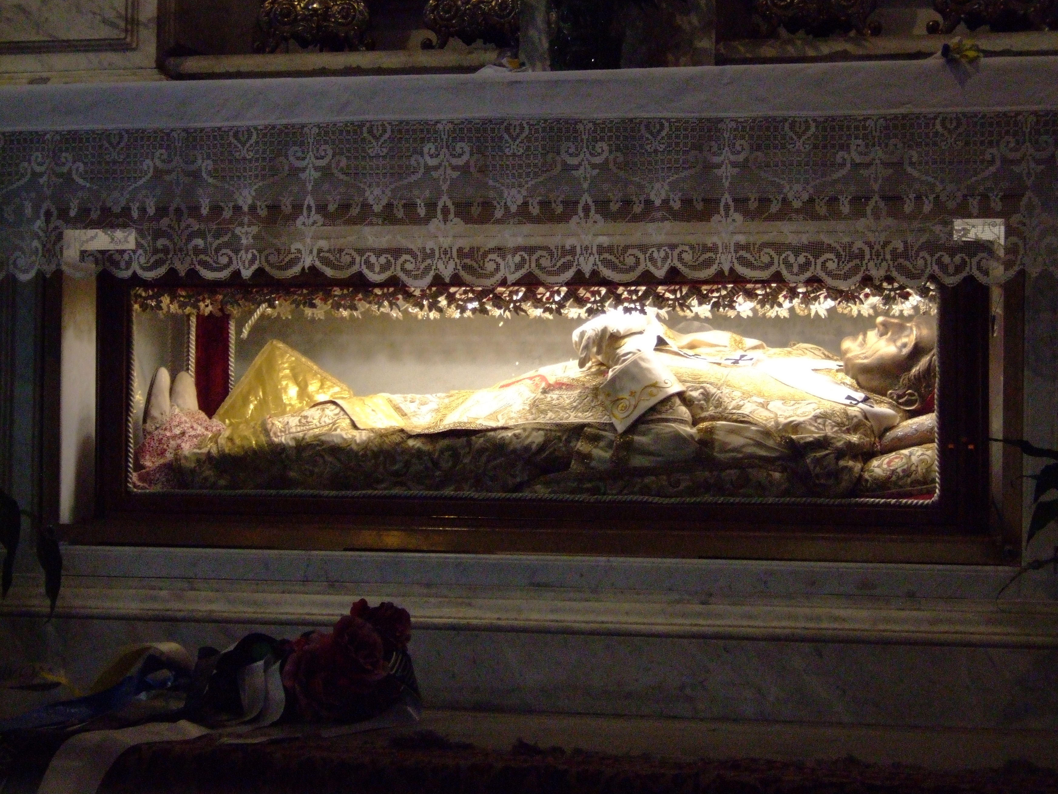 Duomo di Udine Altare di san Giuseppe Teca con corpo Beato Bertrando di San Genesio